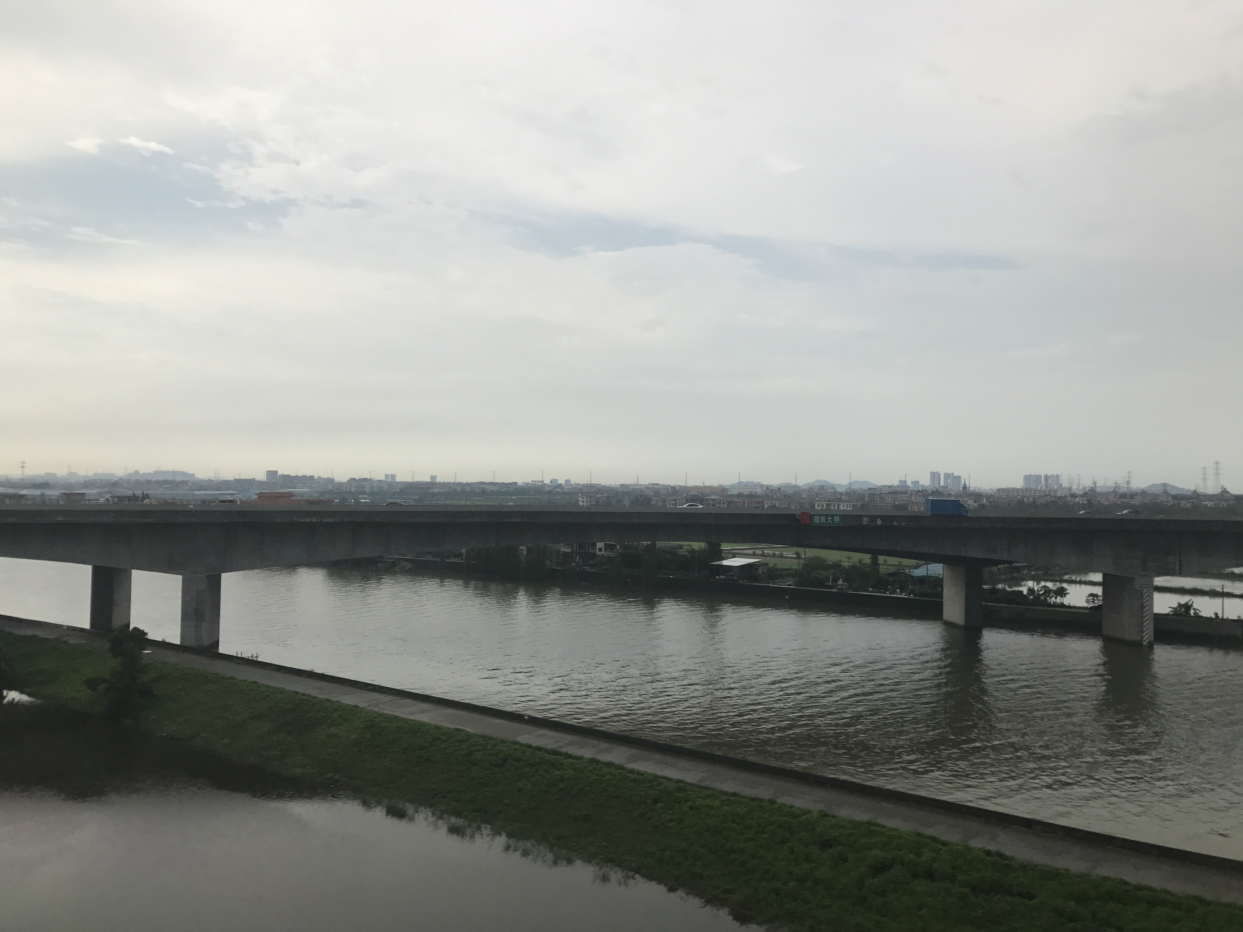 深圳北行きの高速鉄道列車より望む広東省広州市南沙区の蕉門水道